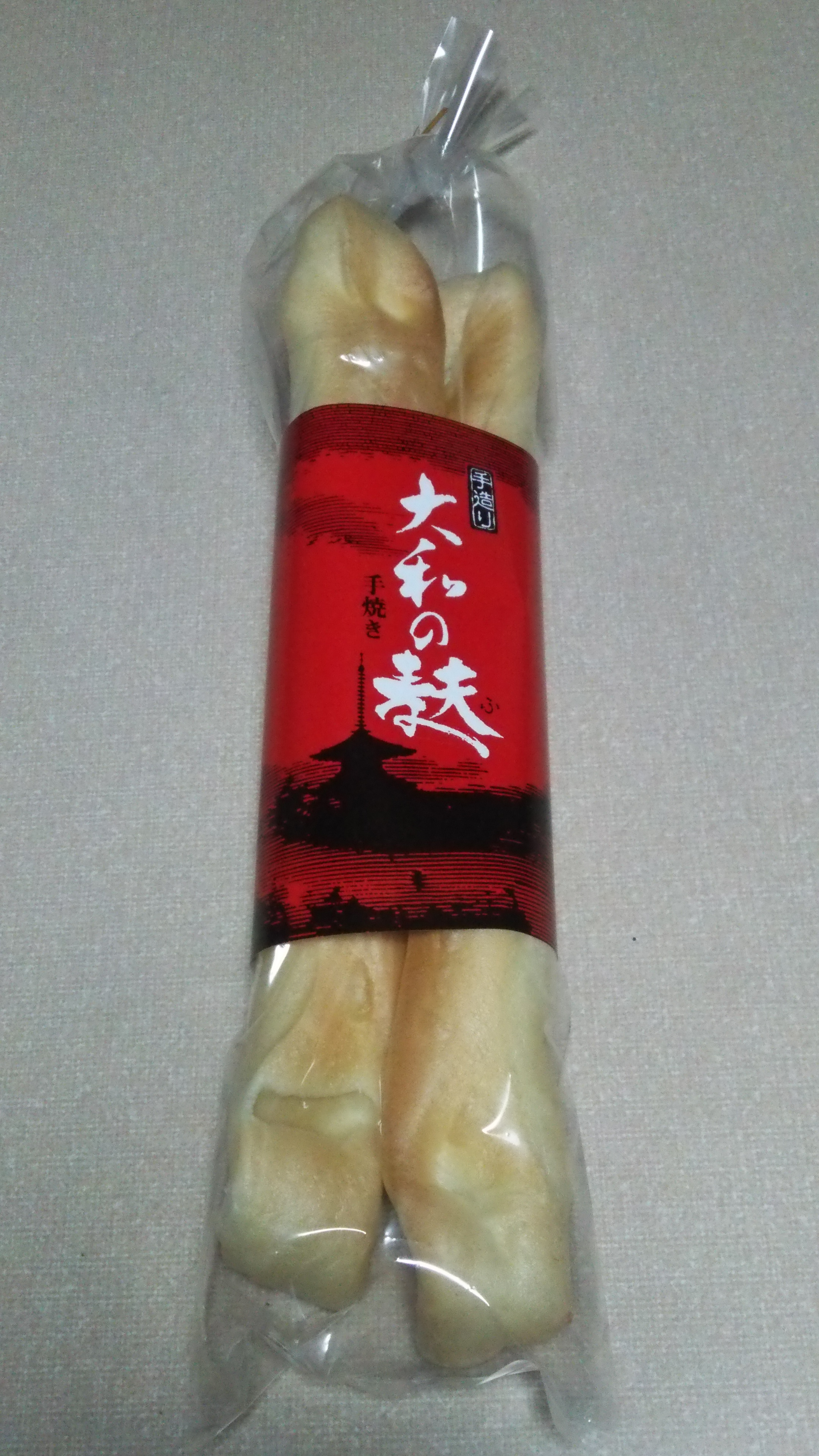 日本一長い「大和麩」